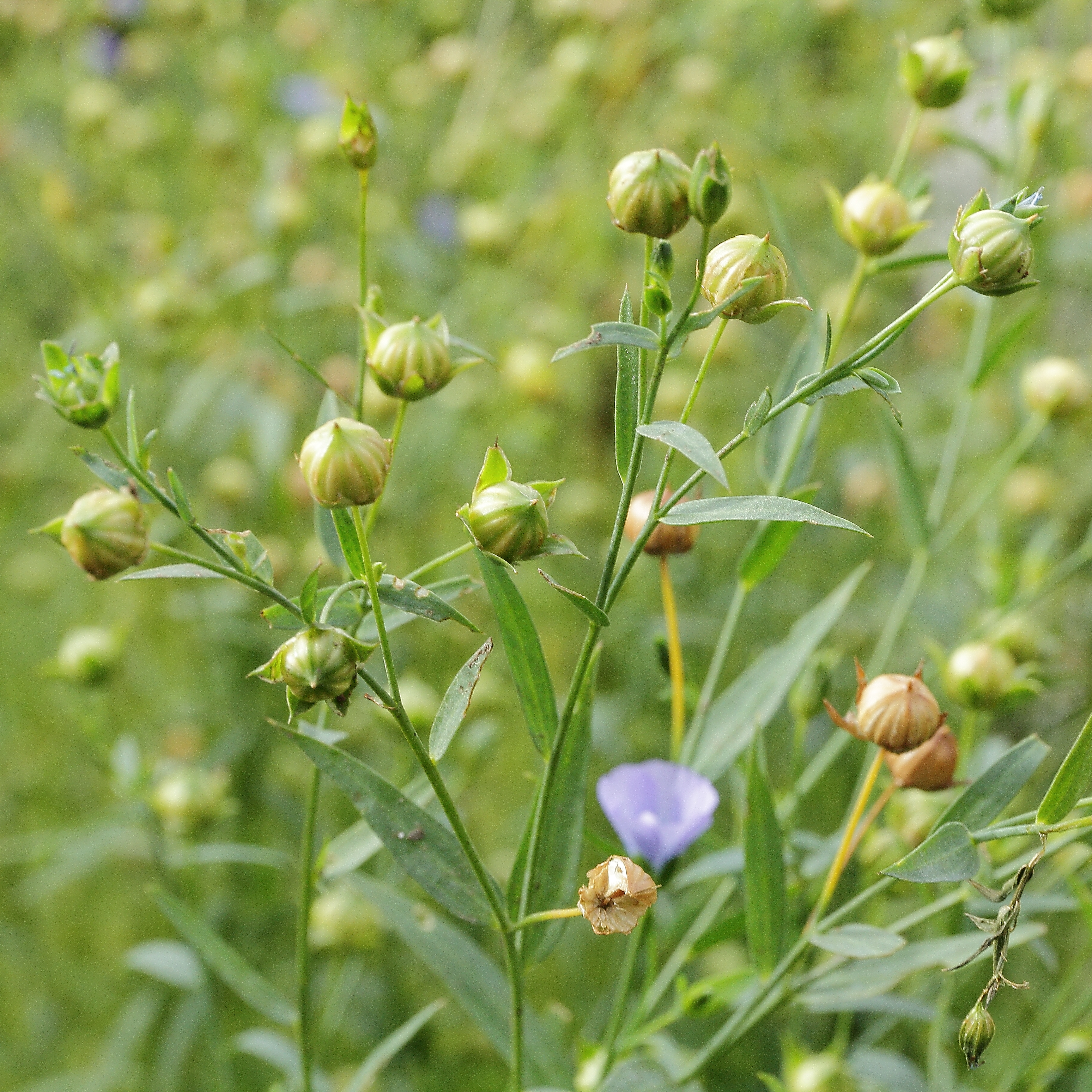 Linum usitatissimum i Västerås botaniska trädgård.